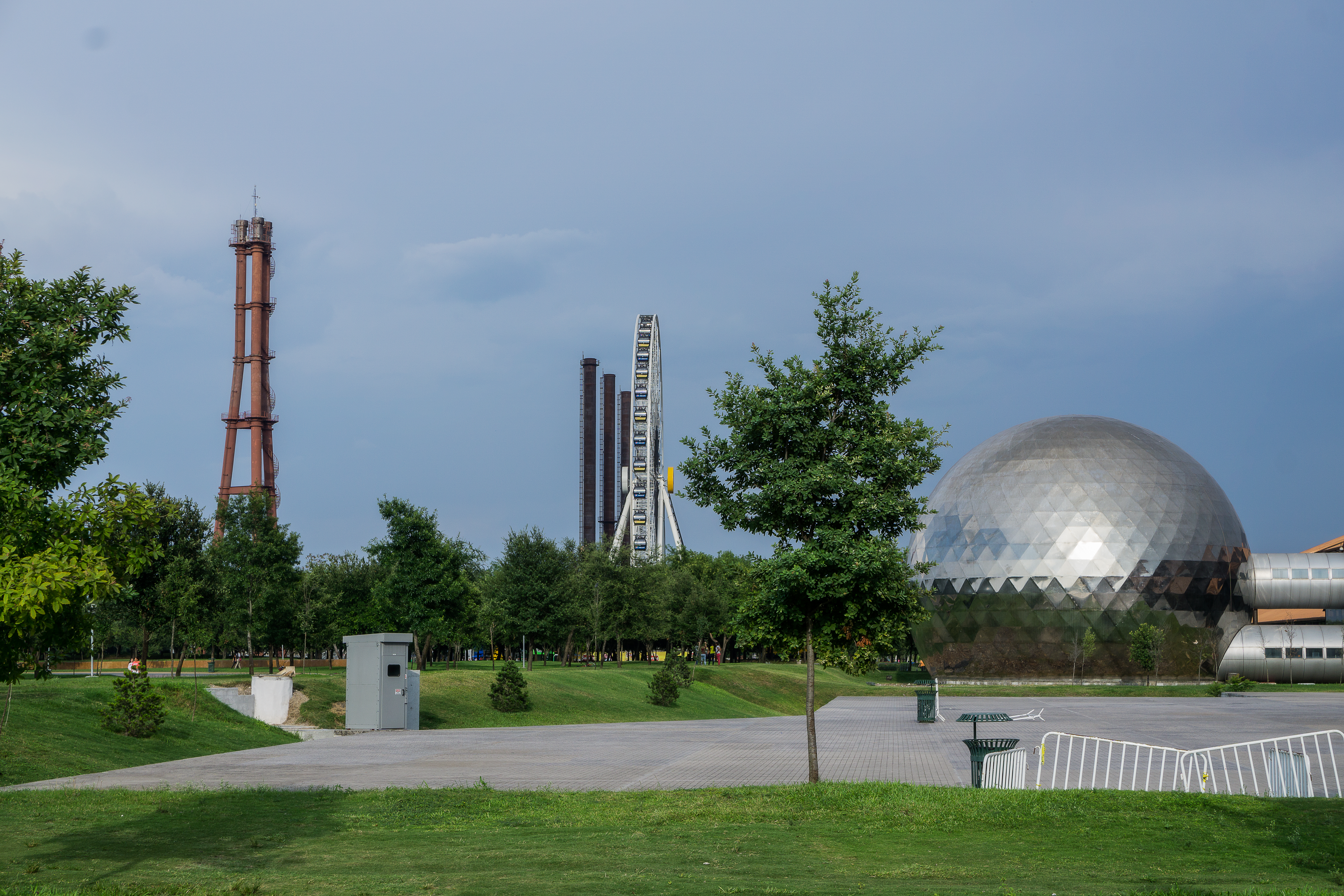 Parque Fundidora.